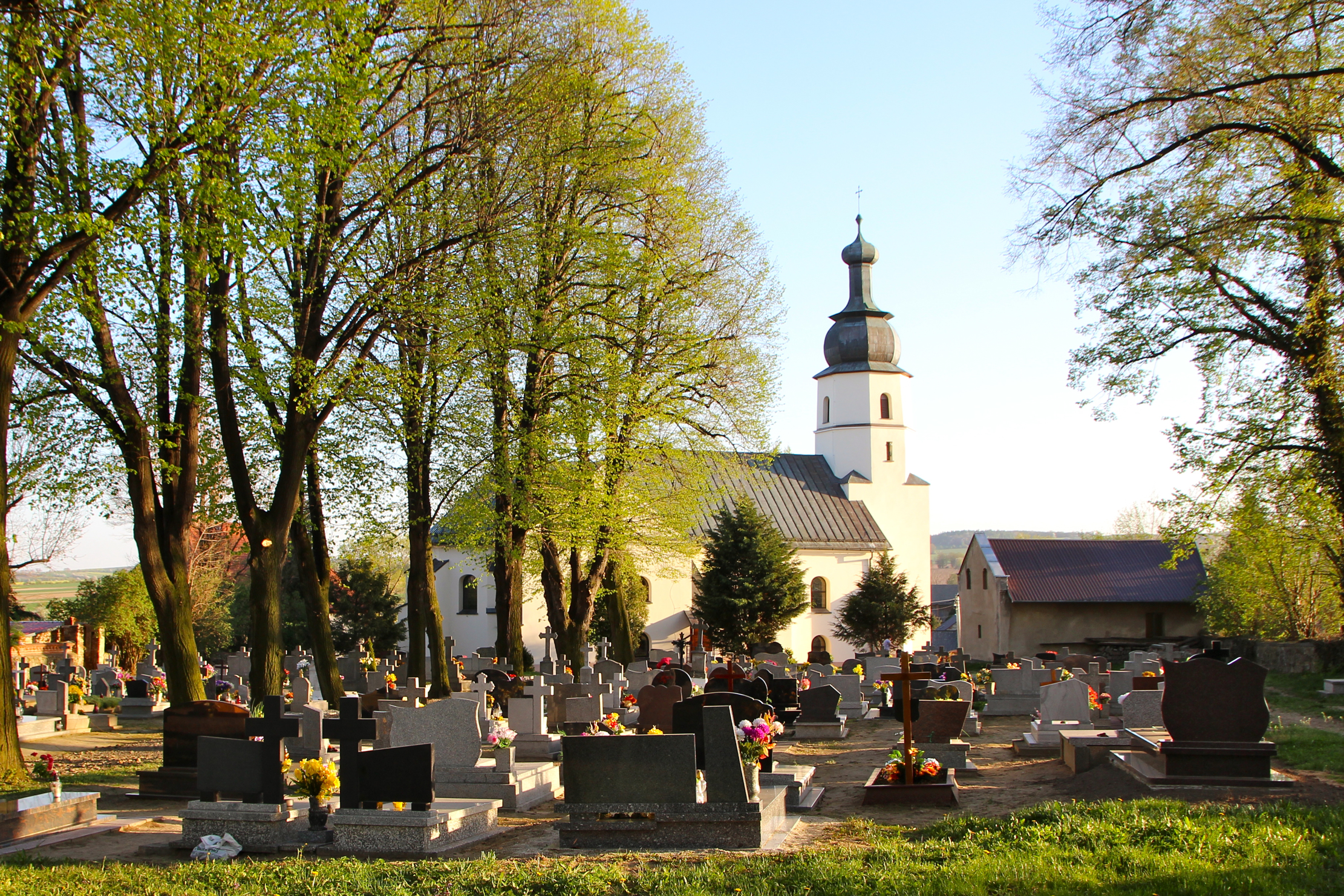 Zubrzyce – rzymskokatolicki kościół parafialny p.w. śś. Piotra i Pawła, 1583, XVIII, 1896.